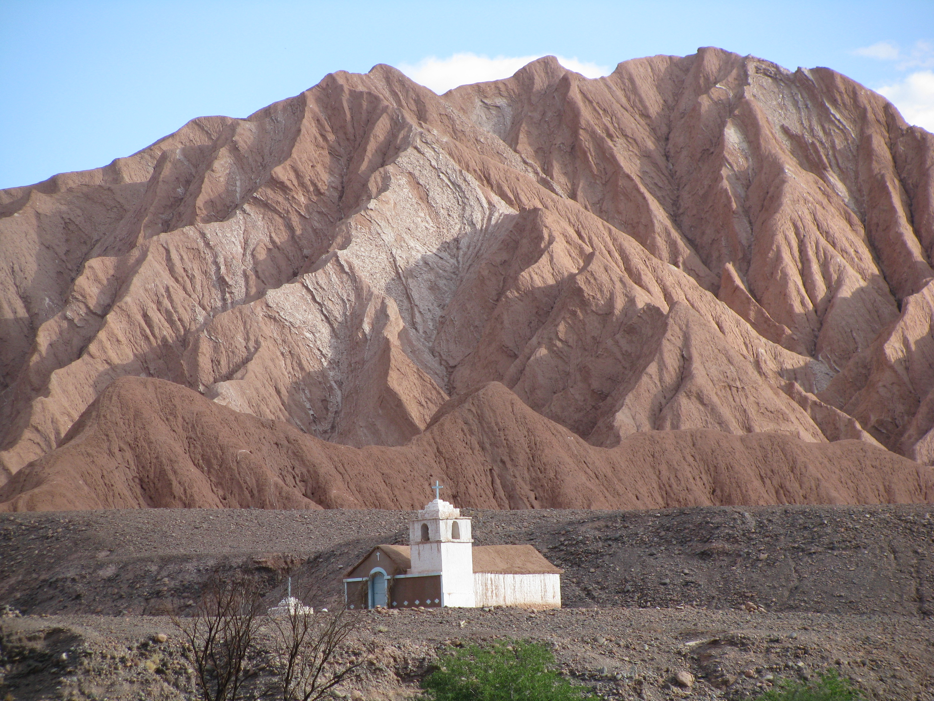 Capilla de San Isidro, Catarpe, II región Antofagasta, Chile